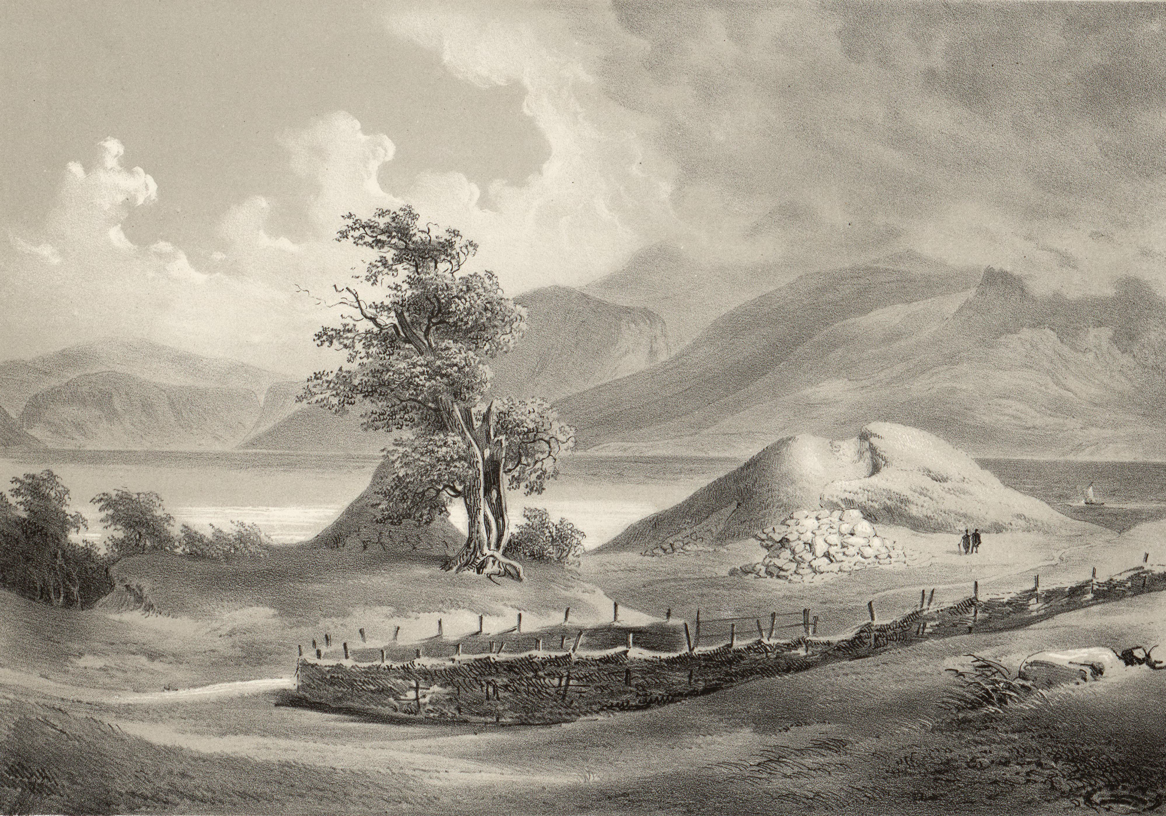 Illustrasjon hentet fra boken "Norge fremstillet i Tegninger" av Asbjørnsen, P.Chr. og utgitt av Chr. Tønsberg (no, 1848)